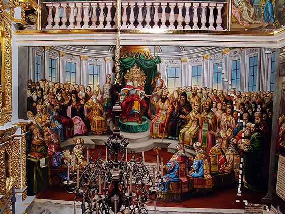 Шестой Вселенский Собор. Роспись в Успенском Соборе Киево-печерской Лавры. Художники